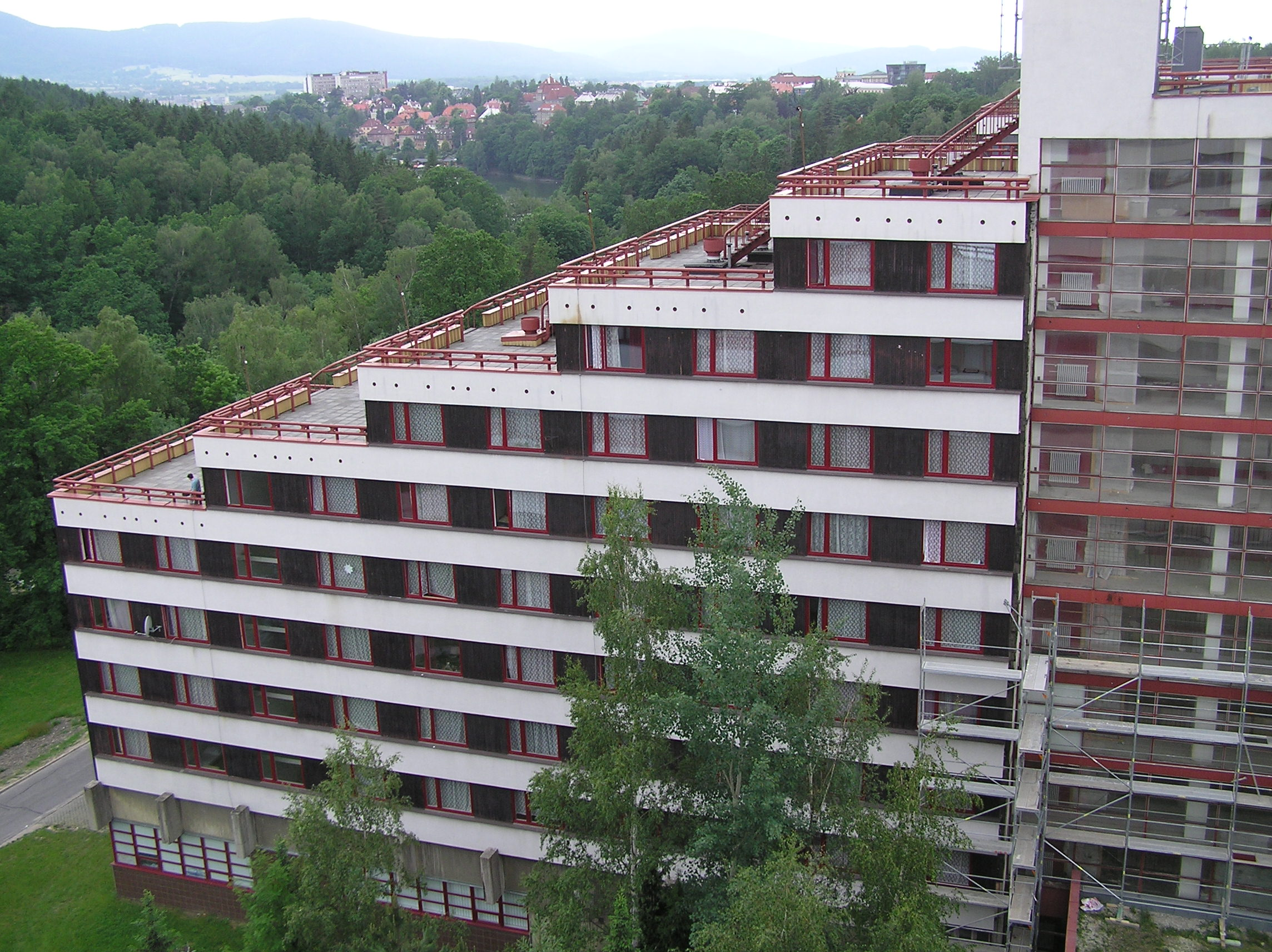 Unu el la blokoj A, B, C de la studenthejmo Harcov de la Teĥnika universitato en Liberec kiu estas la kongresejo de la 65-a IJK.